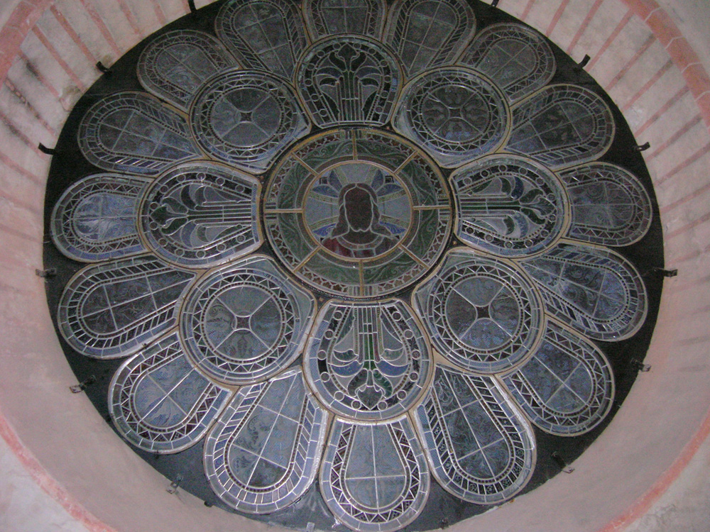 Fensterrose in der Westfassade der Gadebuscher Stadtkirche, Ansicht von Innen